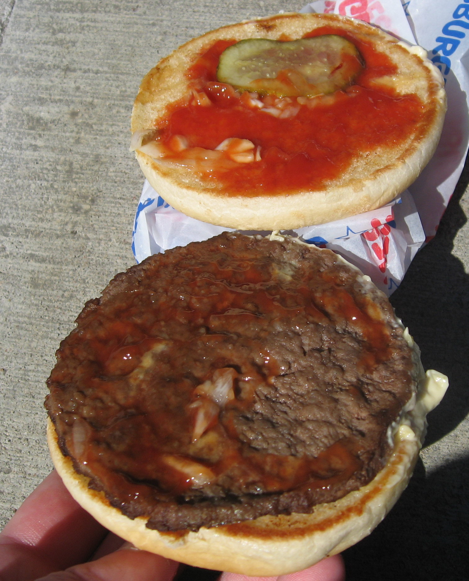 Hamburger od společnosti Hesburger, vnitřek